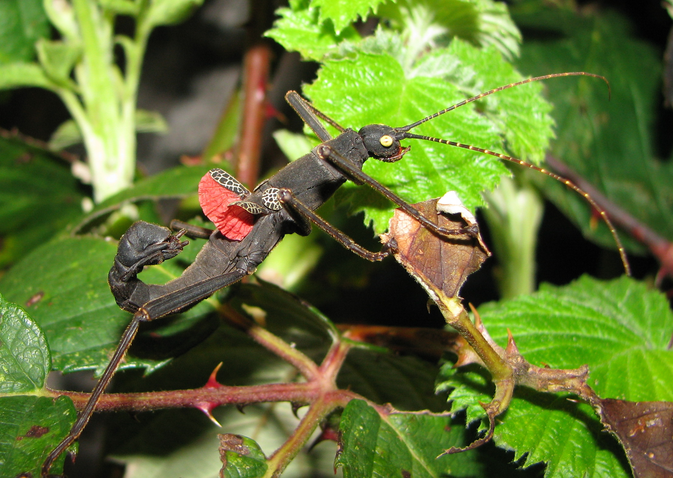 Peruphasma schultei - threaten male (drohendes Männchen)